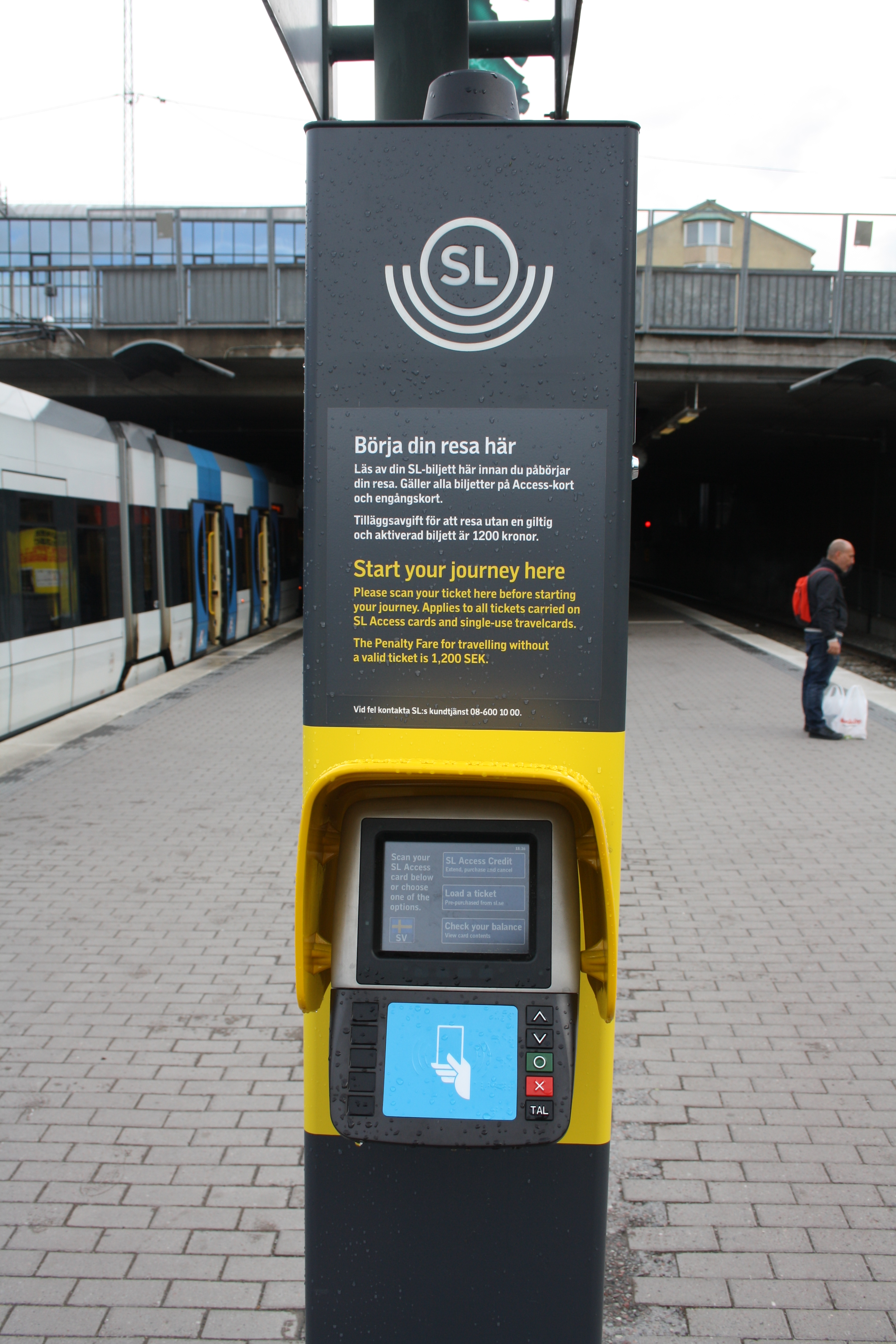 Biljettstolpte Tvärbanan